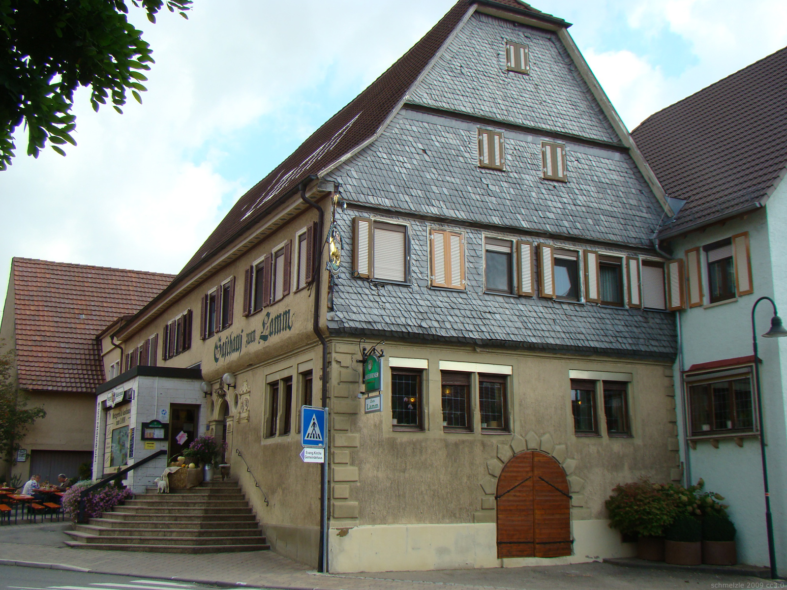 Historisches Gasthaus Lamm in Langenbrettach